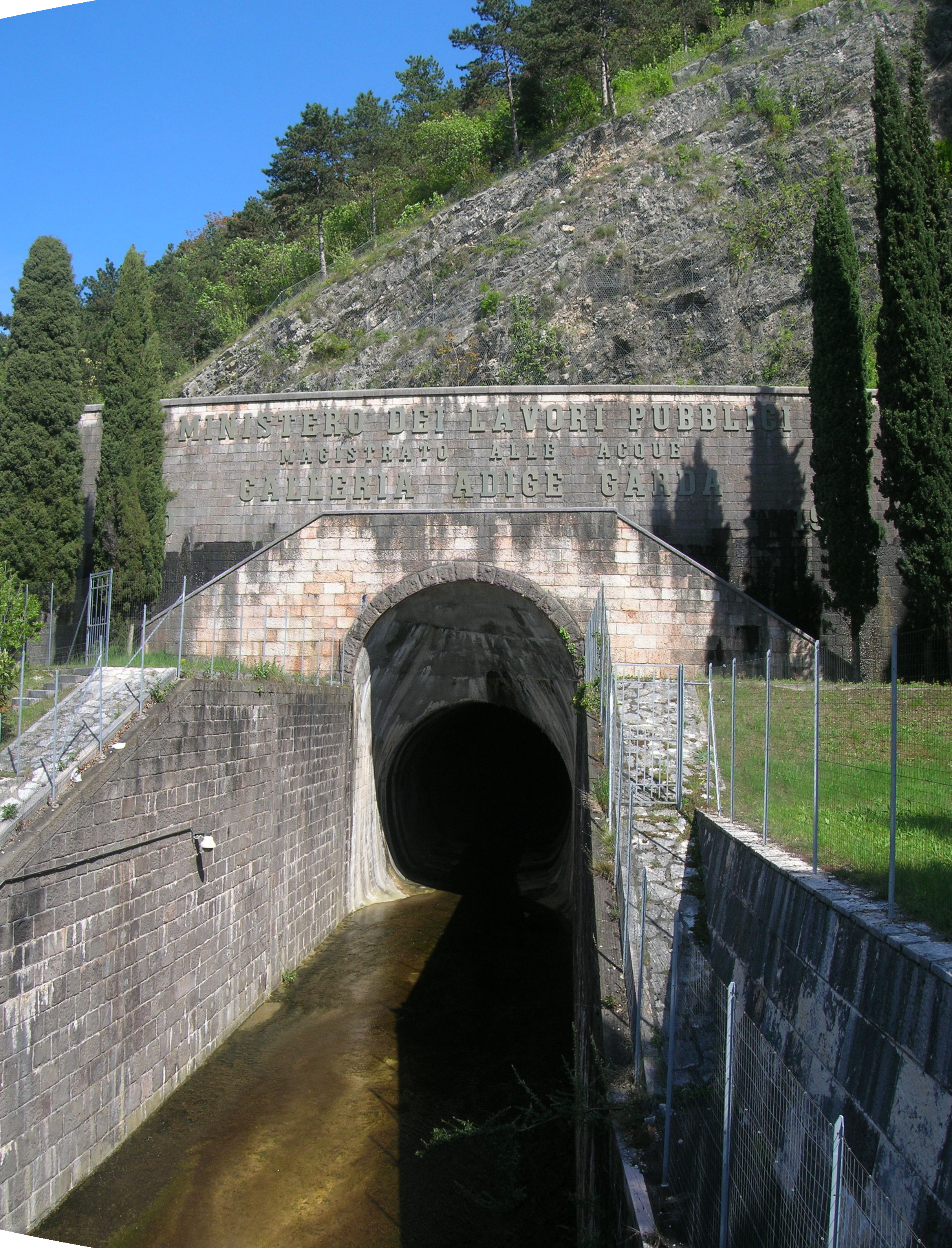 Lo sbocco della galleria Adige-Garda, visibile dalla SS249 "Gardesana Orientale" nel comune di Nago-Torbole (TN)